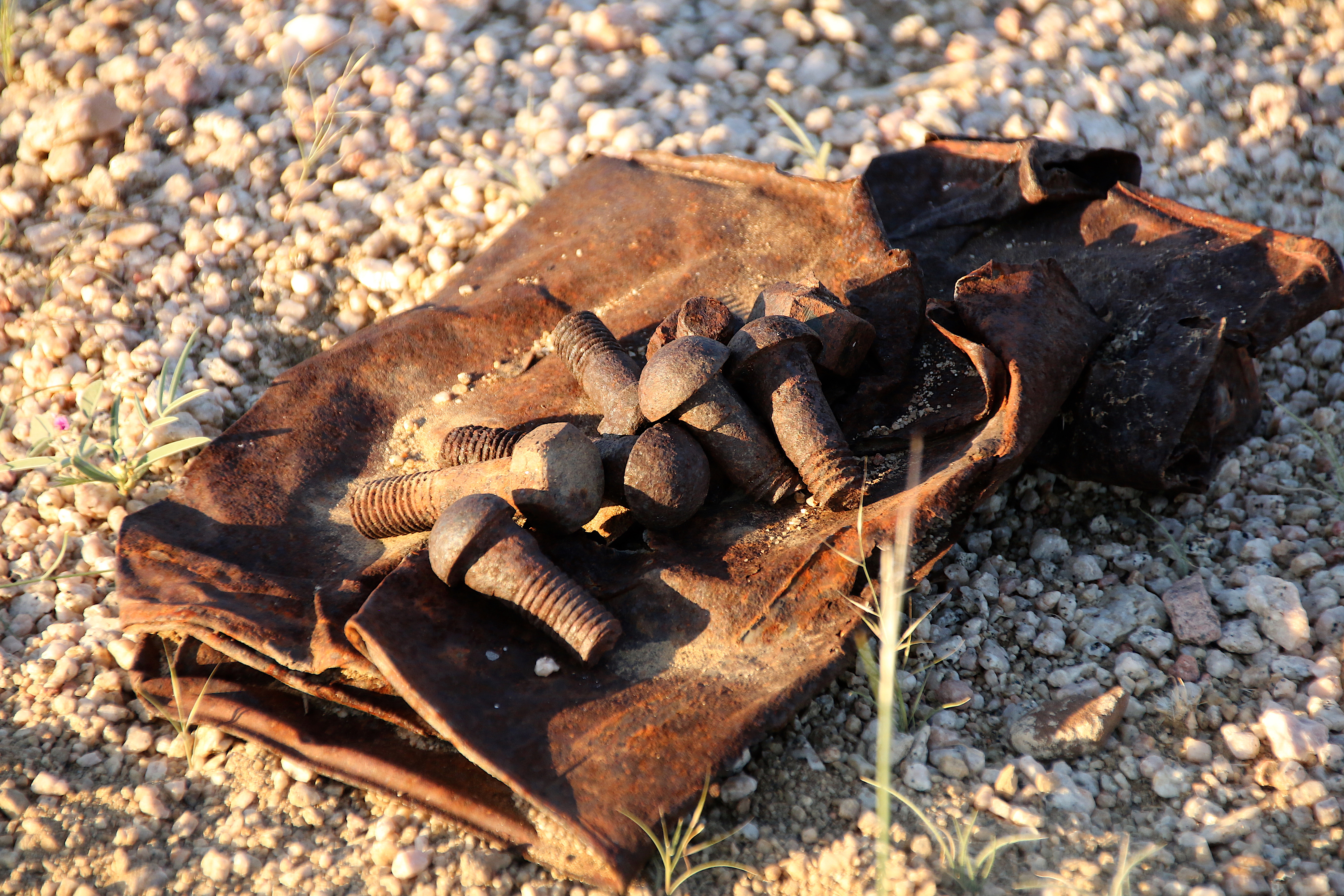 Reste der Zubringerbahn bei Jakaslwater (2018)